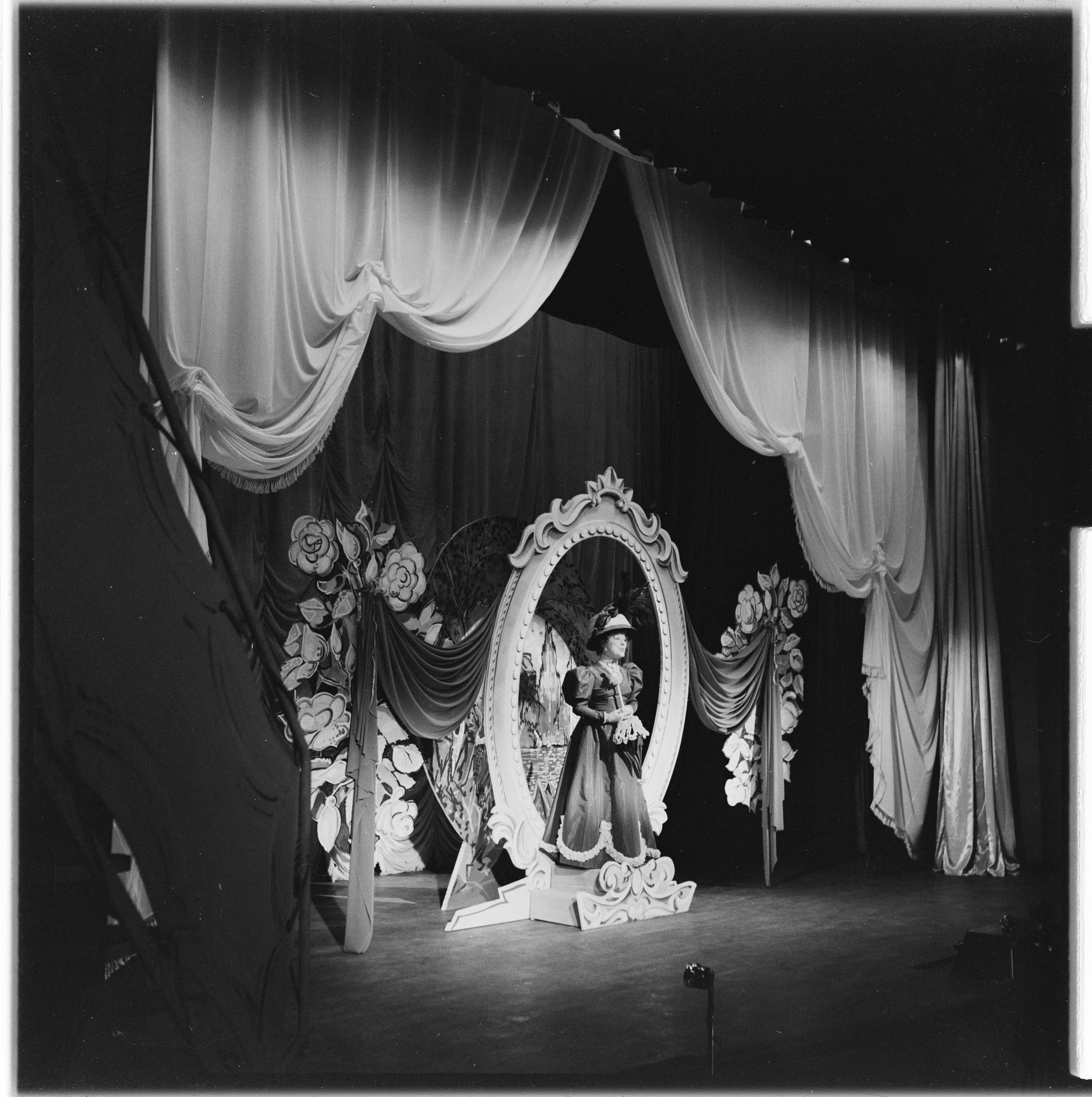 Bildet er hentet fra Arkivverket. Chat Noir revyen 1955. NÅ nr. 37,1955 Arkivinstitusjon : Riksarkivet Arkivnavn : Billedbladet NÅ Sted : Norge, Oslo, Oslo, Emneord: teater, revy, chat noir, skuespillere Avbildet